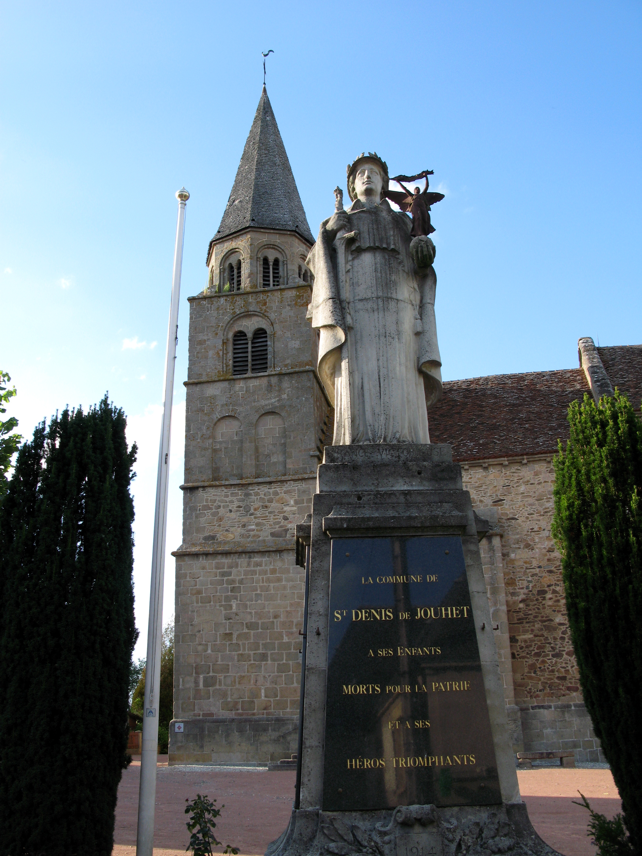 Saint-Denis-de-Jouhet (Indre, France) - Le monument-aux-morts vu dans l'axe du clocher de l'église. . . .